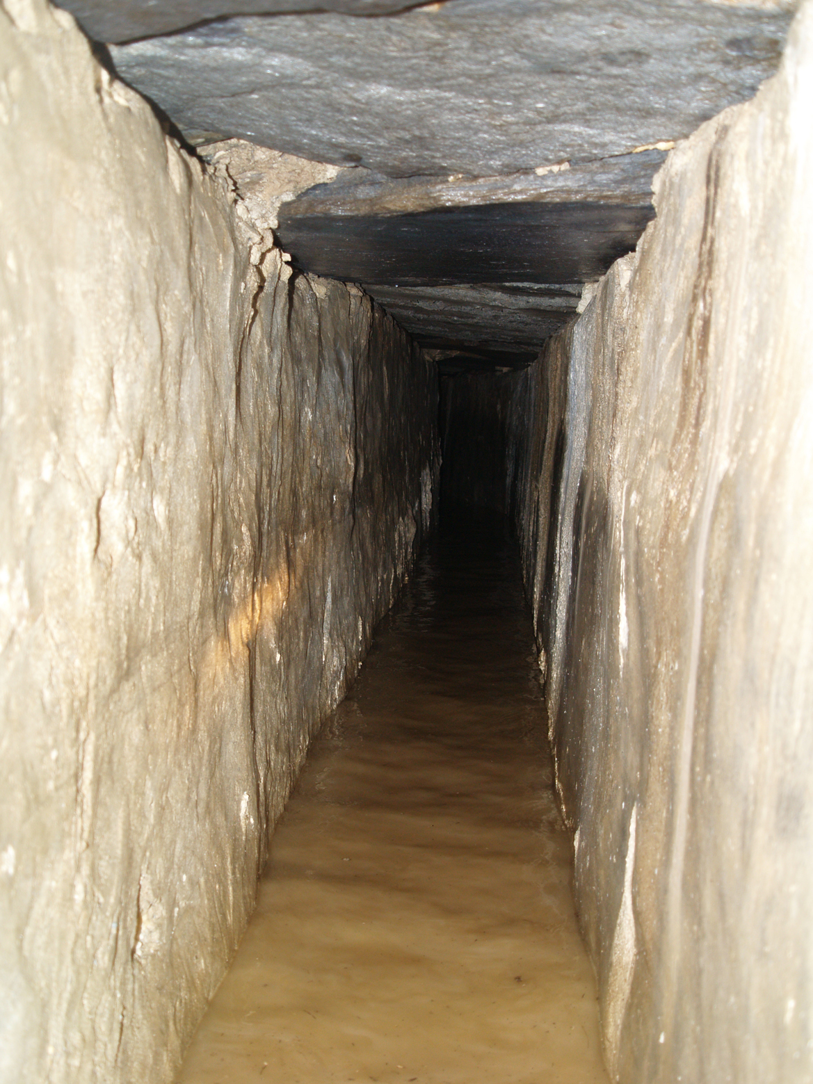 Detalle del interior del caño nuevo o contracaño